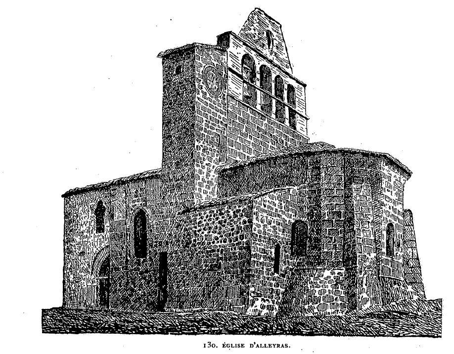 Dessin de l'église d'Alleyras par Felix Thiollier (1842-1914) extrait de "L'architecture religieuse à l'époque romane dans l'ancien diocèse du Puy " texte par Noël Thiollier (1900)